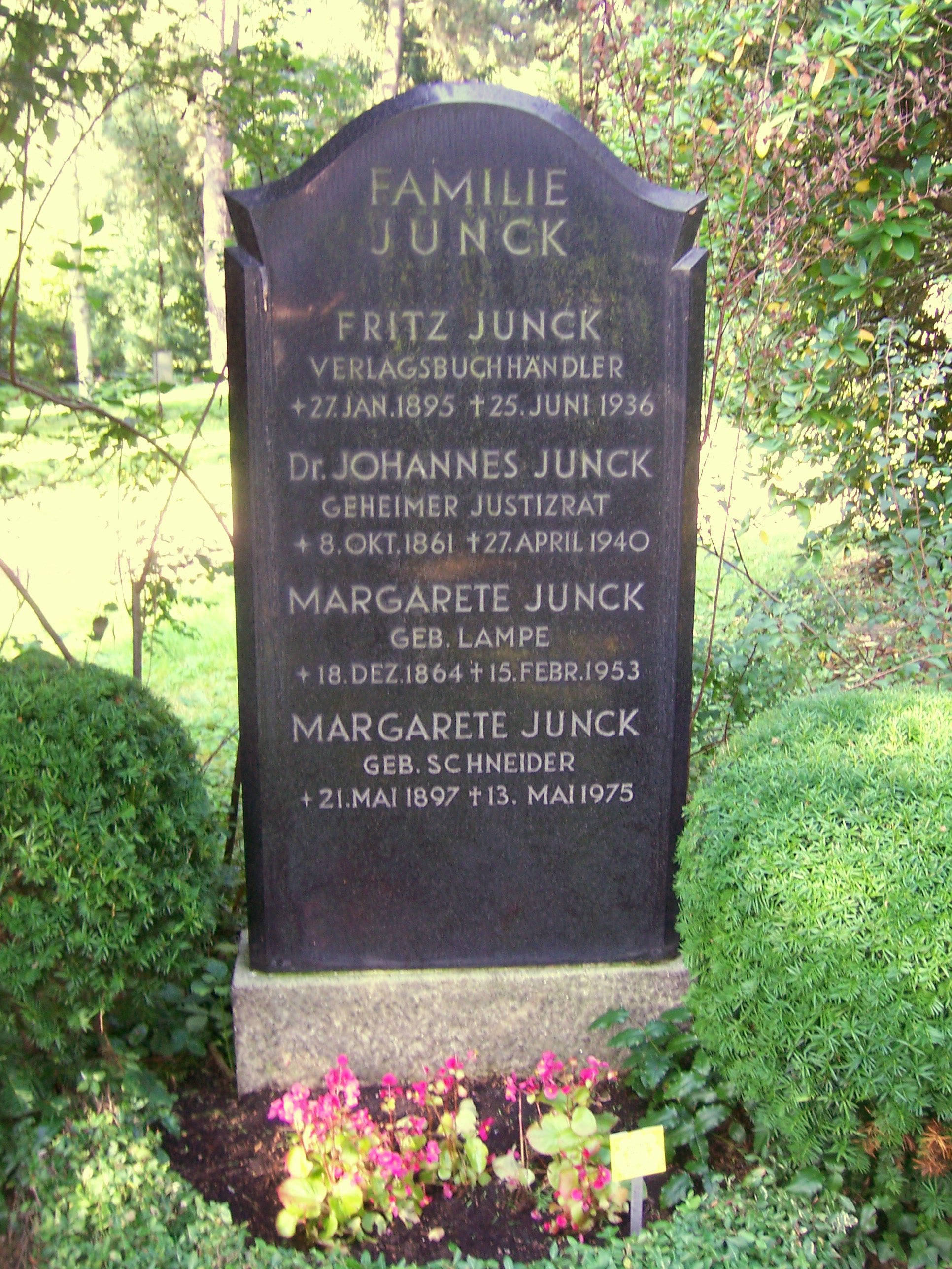 Grabstätte Familie Junck